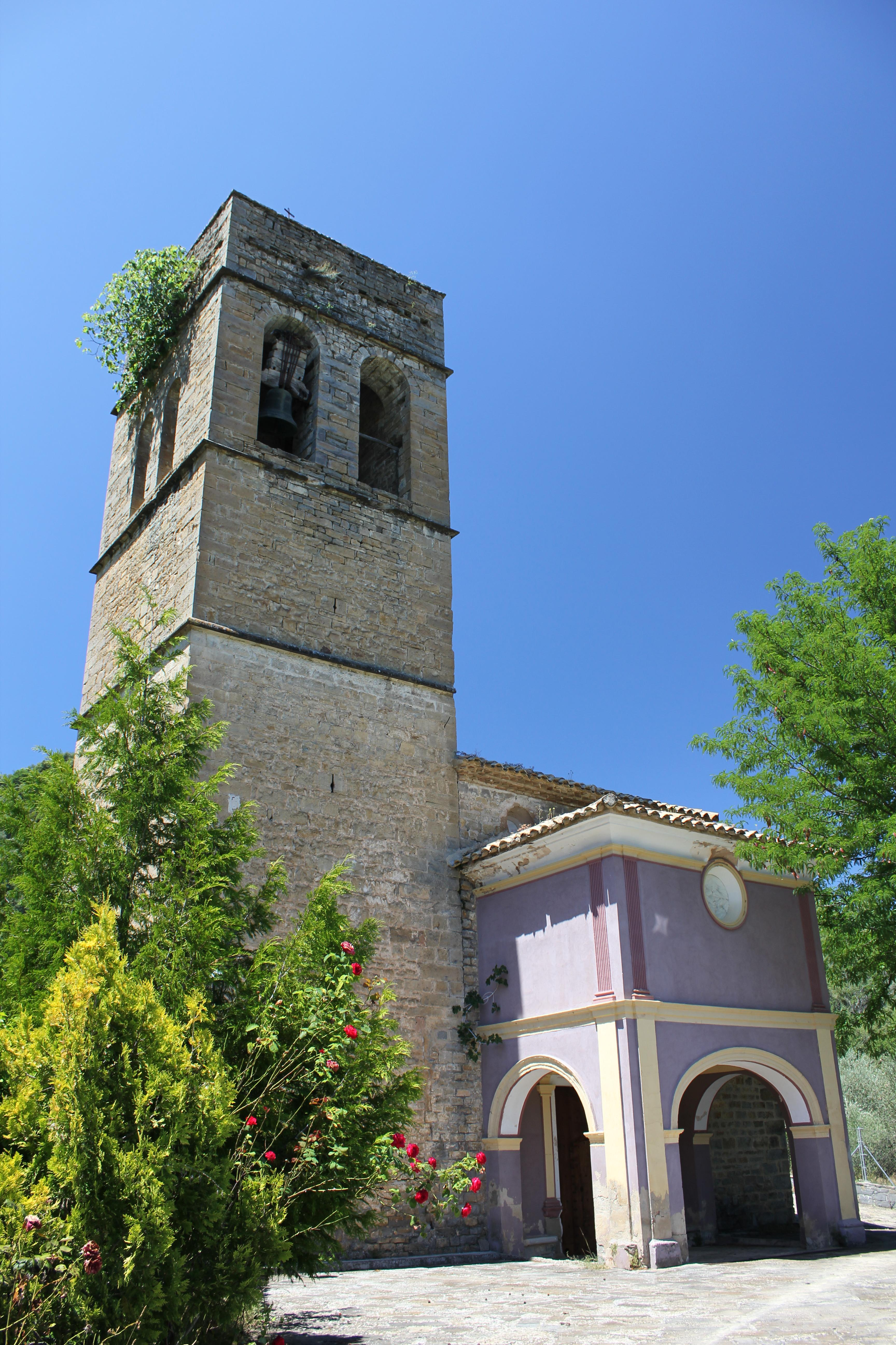 Aragonés: Ilesia parroquial de Palo, consagrada á Sant Martín